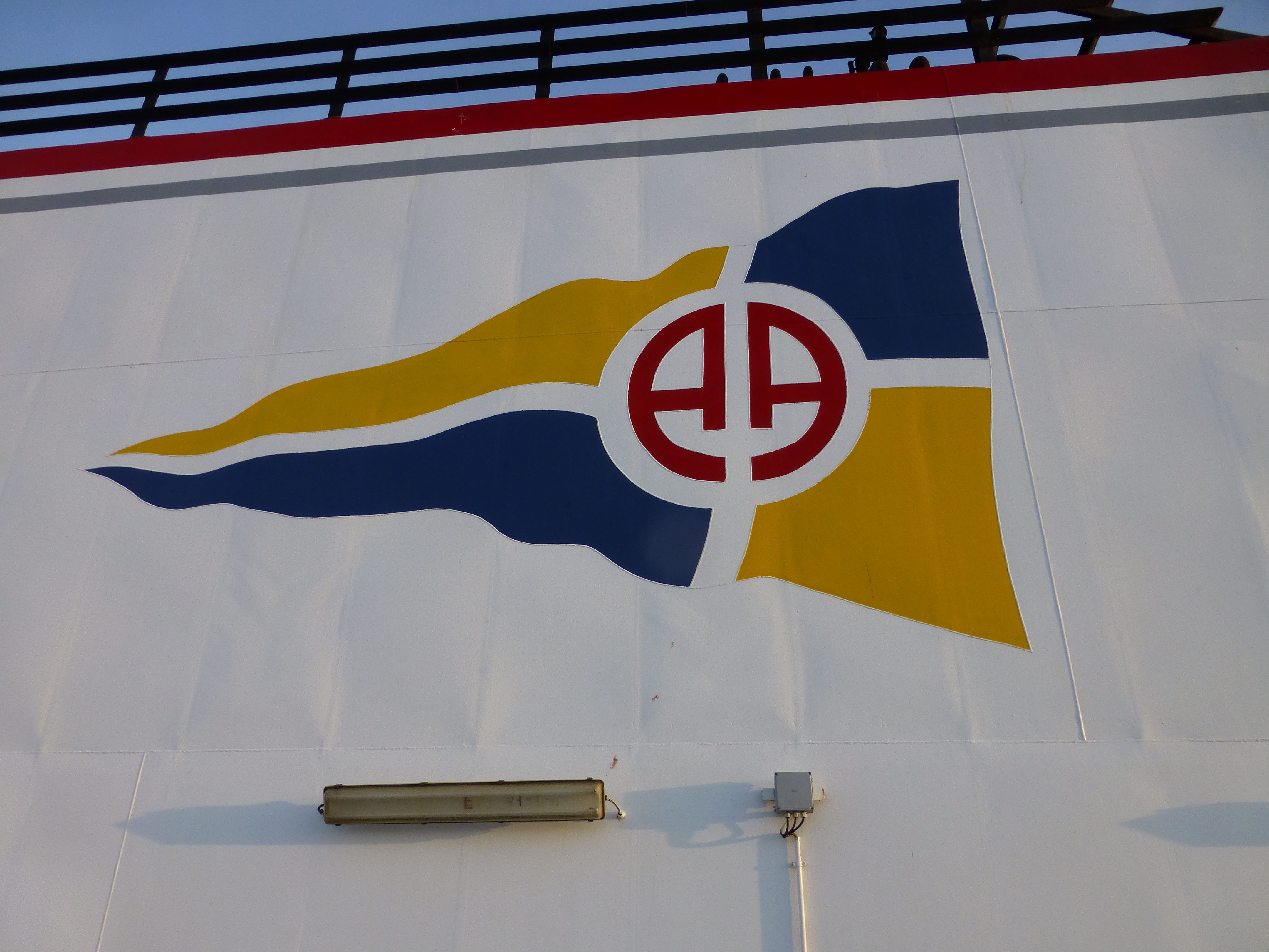 Distintivo de la compañía "Naviera Armas", en la chimenea de sus 10 buques tipo ferry. Las letras "AA" se refieren al nombre de su fundador: Antonio Armas Curbelo. Fotografía tomada el día 4 de enero de 2013, a bordo del ferry "Volcán de Tamasite", efectuando la travesía entre los puertos de Santa Cruz de Tenerife y Las Palmas de Gran Canaria.